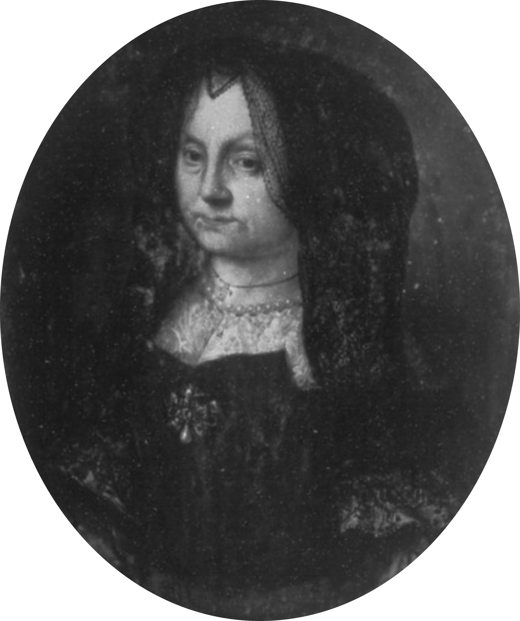 Margarete Gloxin geb. Jügert († 16. Januar 1683), Ehefrau des Balthasar Gloxin, als Witwe. Epitaph-Porträt im Schleswiger Dom